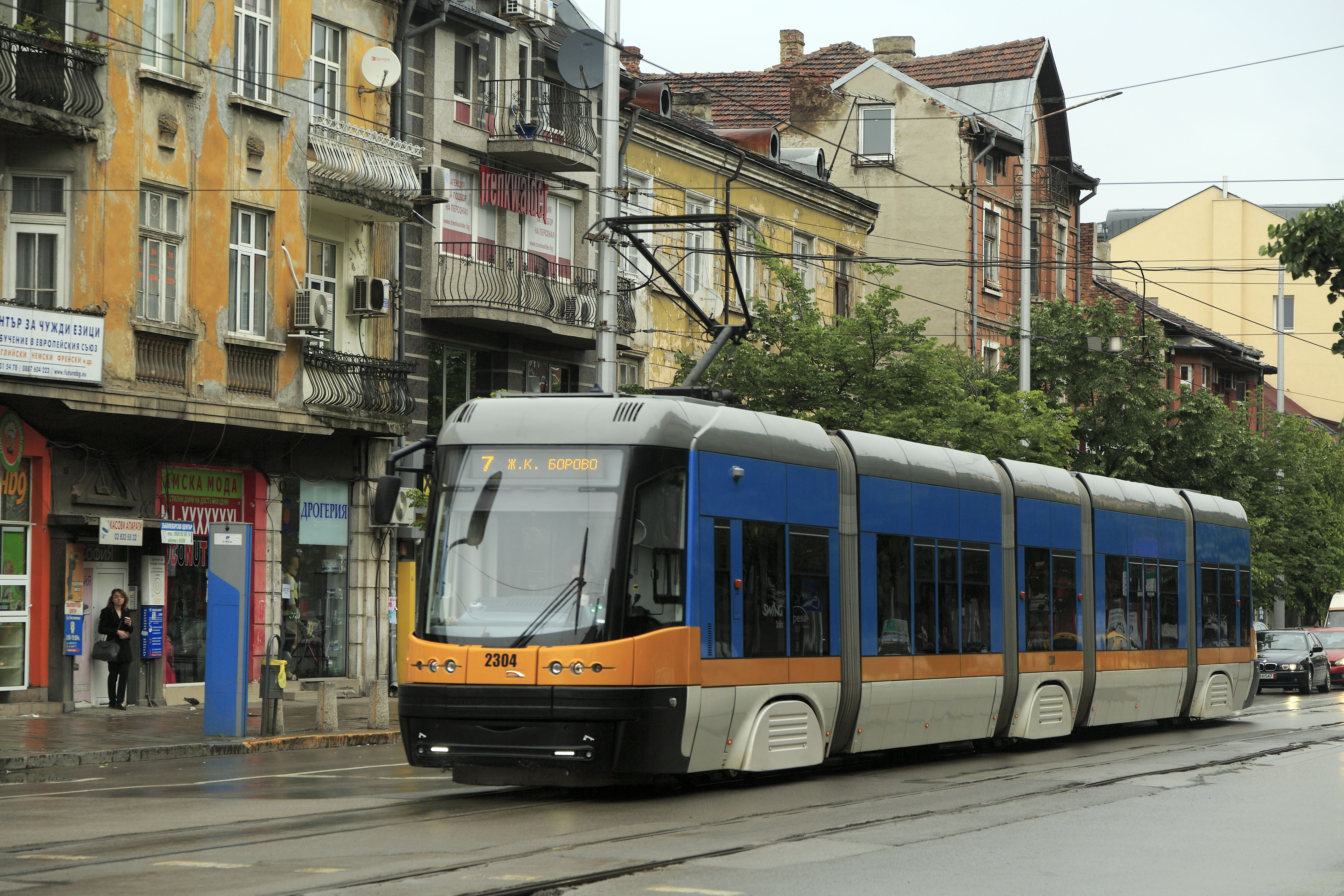 Ein Zug der Niederflurlinie 7 zum Wohngebiet Borovo.